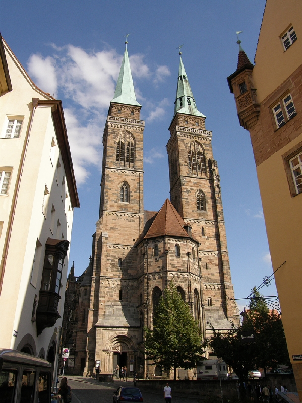 Nürnberg Testbilder Verzerrung